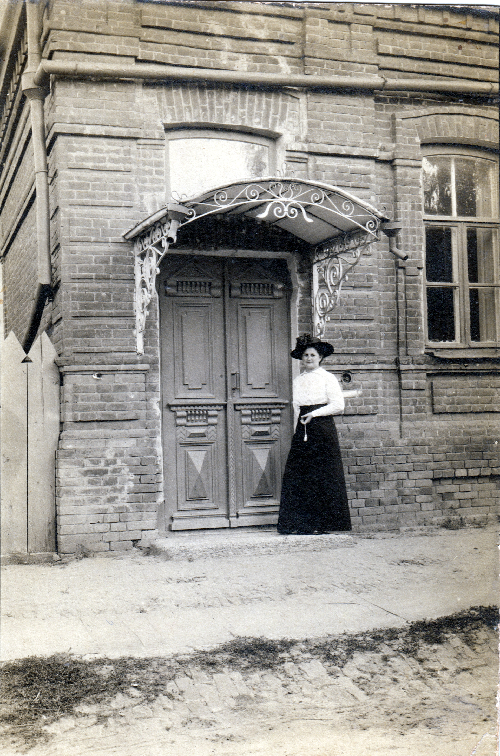 Александра Ипполитовна Бабкина (в дев. Прощакова) у своего дома на Кадетской улице, Новочеркасск.